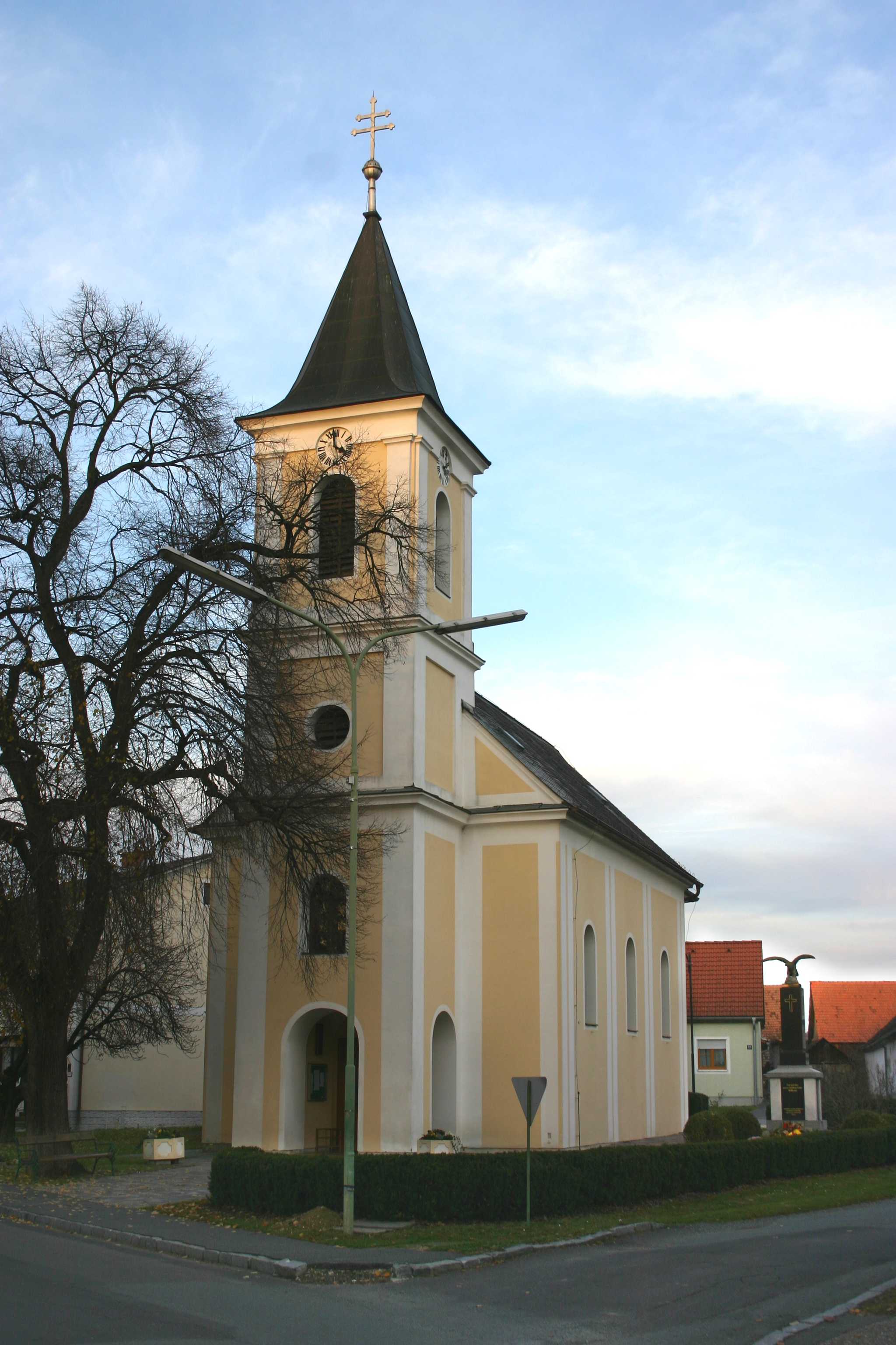 Tobaj römisch-katholische Pfarrkirche